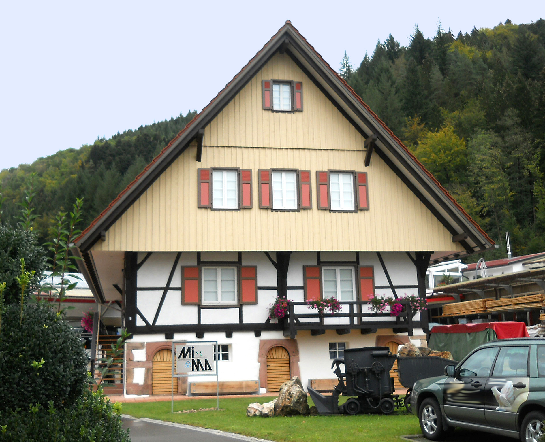 Mineralien- und Mathematikmuseum Oberwolfach (Hausansicht)